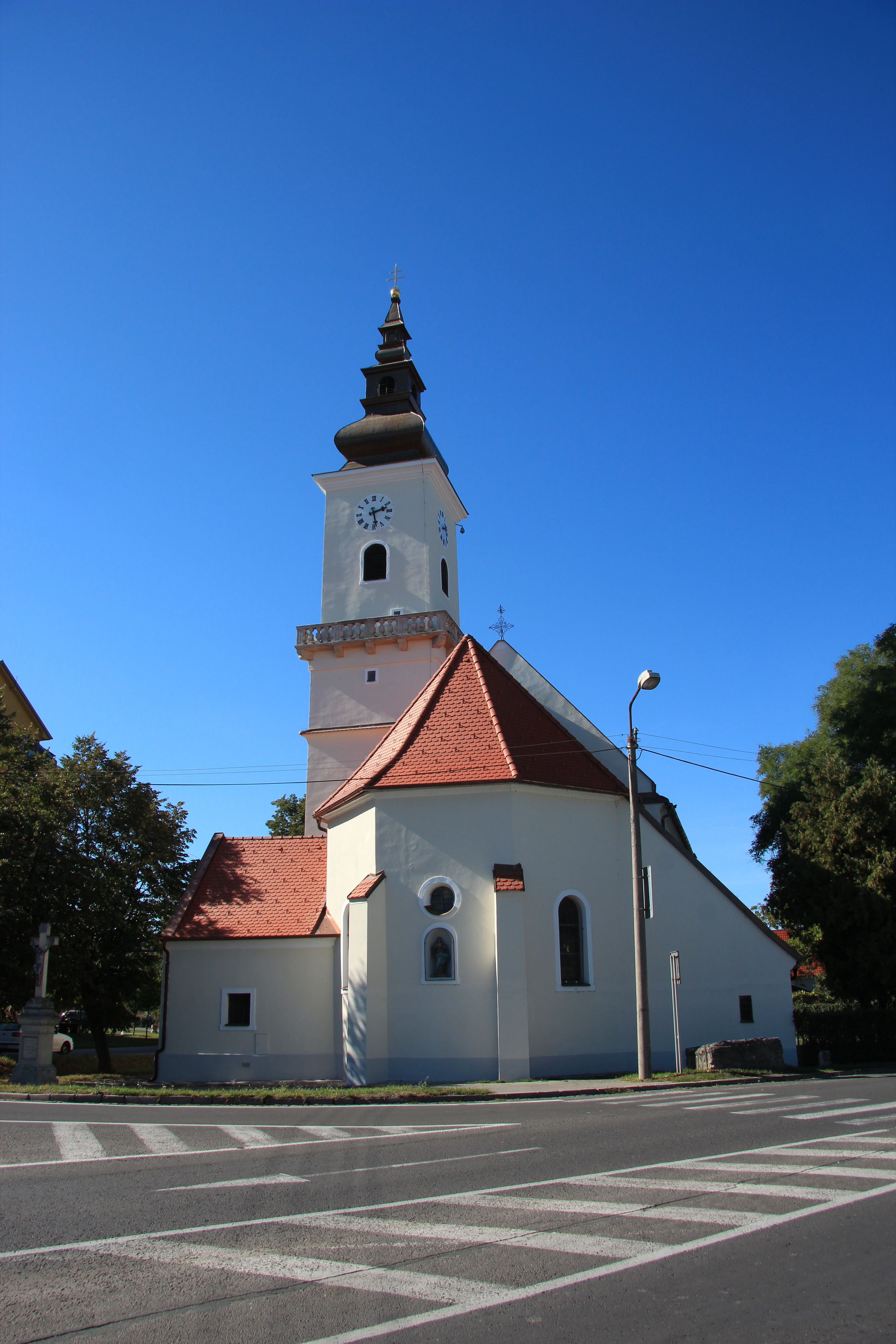 römisch katholische Pfarrkirche der hl. Dreieinigkeit